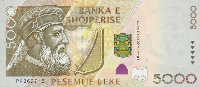 5000 Albanian lek